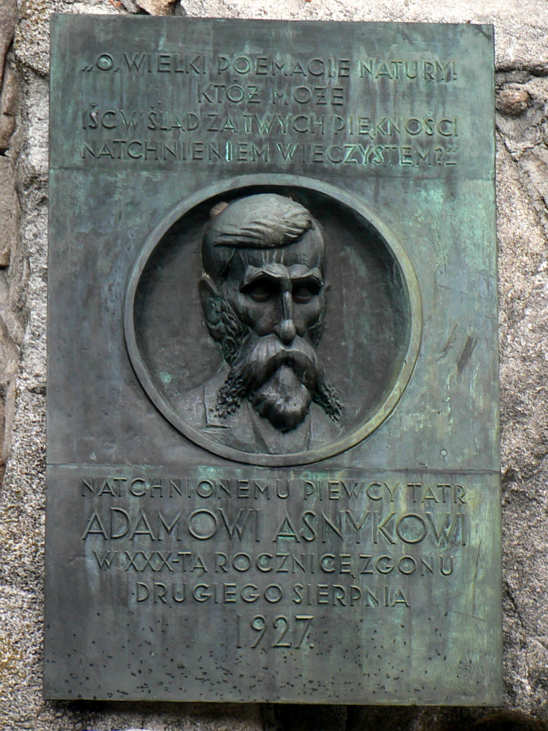 Tablica poświęcona Adamowi Asnykowi na ścianie schroniska "Murowaniec"